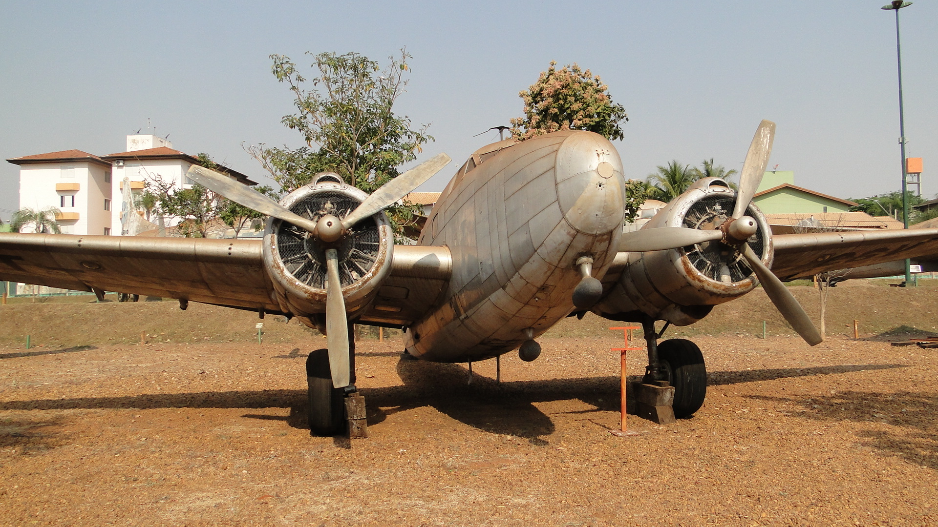 museu de bebedouro 06-09-2010 15-03